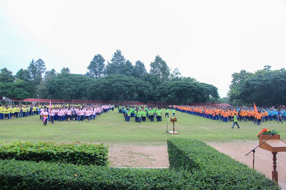 ภาพตัวอย่างงานกีฬาสีประจำโรงเรียนสันป่าตองวิทยาคม ปี 2561